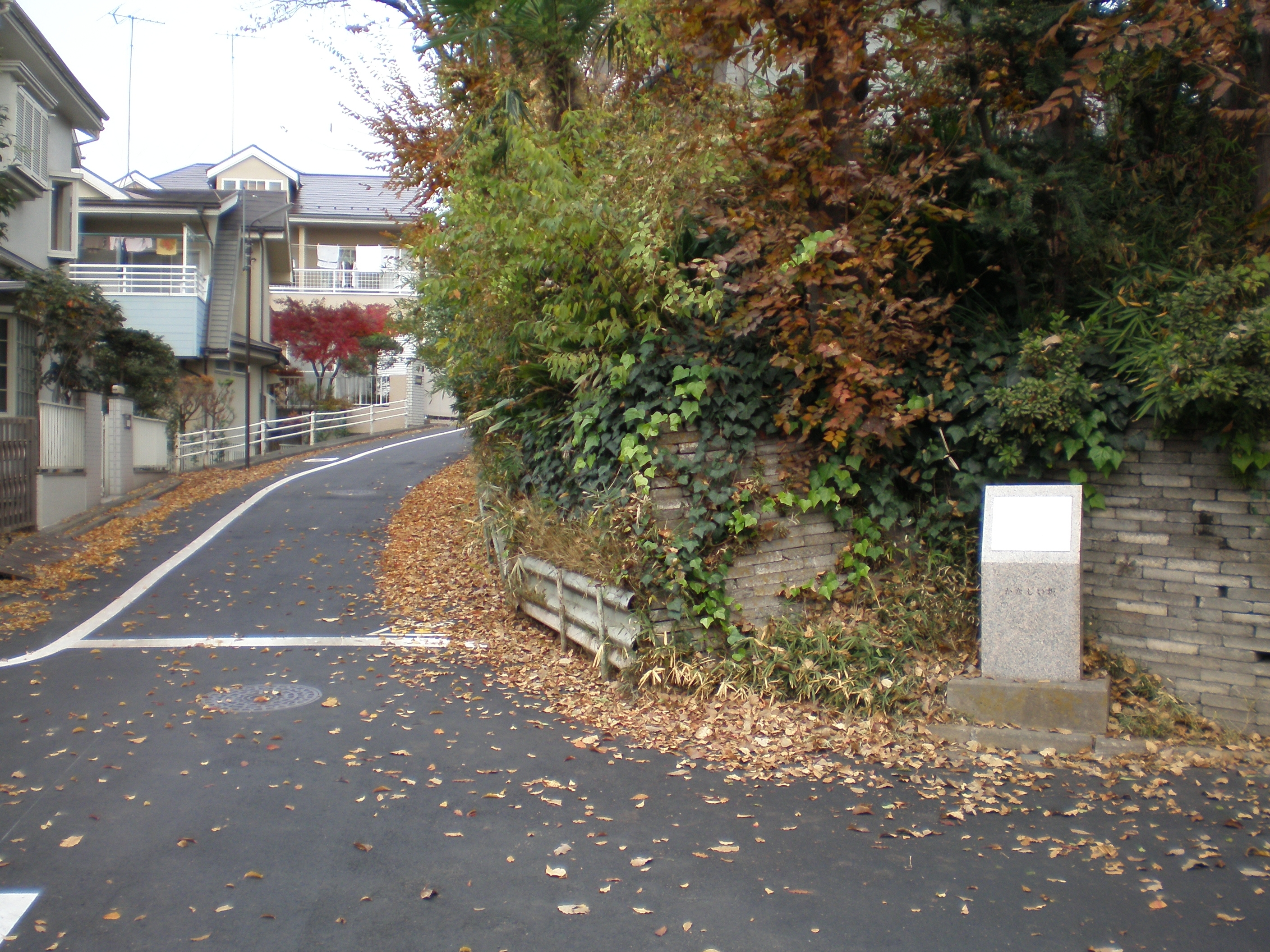 Kanashî Saka in Fuchu, Tokyo.